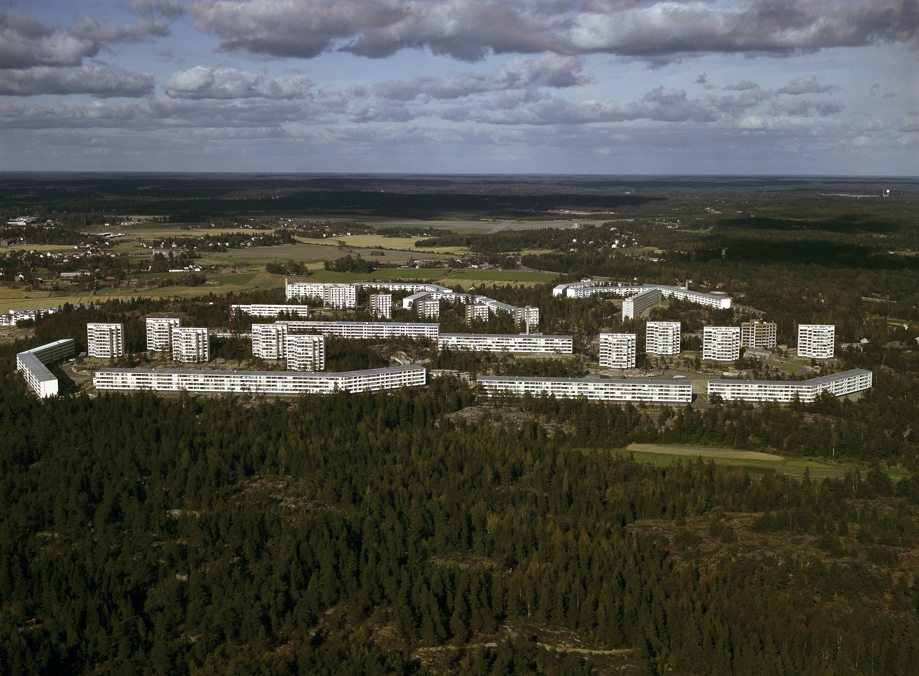 Malmi, Pihlajamäki kuvattuna lounaasta.